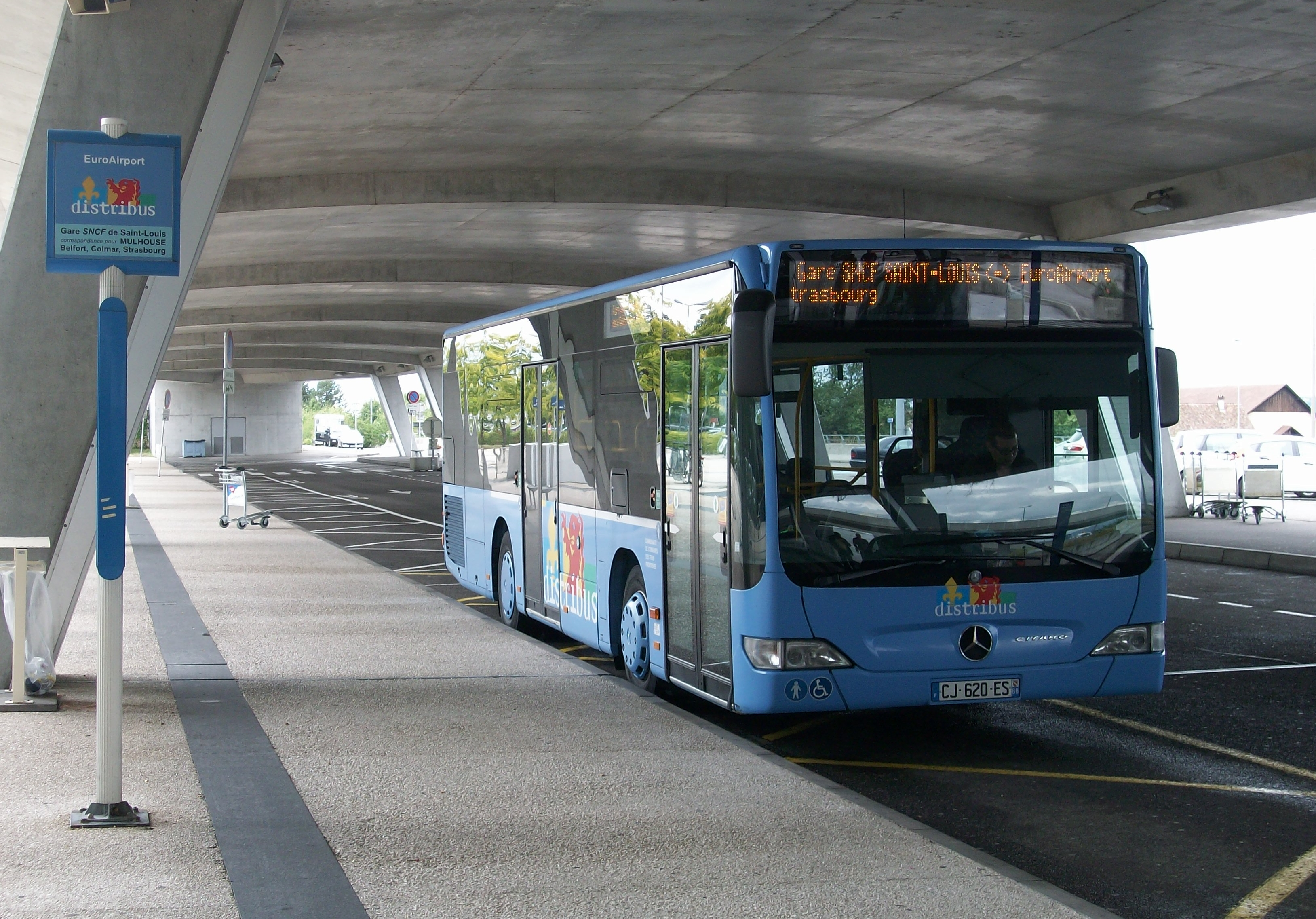 Un autobus Mercedes-Benz du réseau Distribus (Saint-Louis), , côté Français de l'EuroAiport